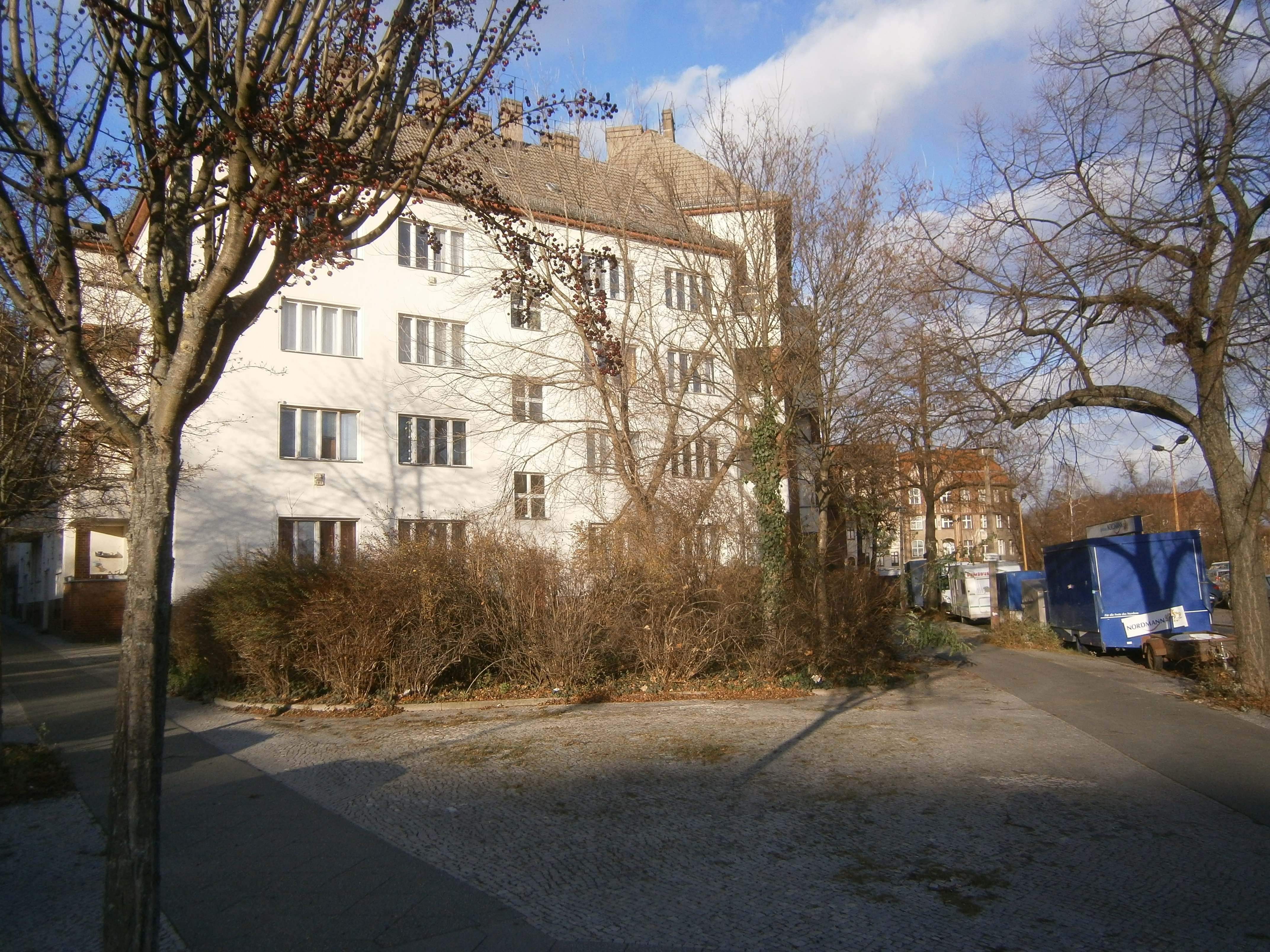 Der Pistoriusplatz ist ein Platz im Berliner Ortsteil Weißensee. Im Bild der Blick nach Norden auf das Eckhaus Nummer 9 am Südwesten des Platzes.